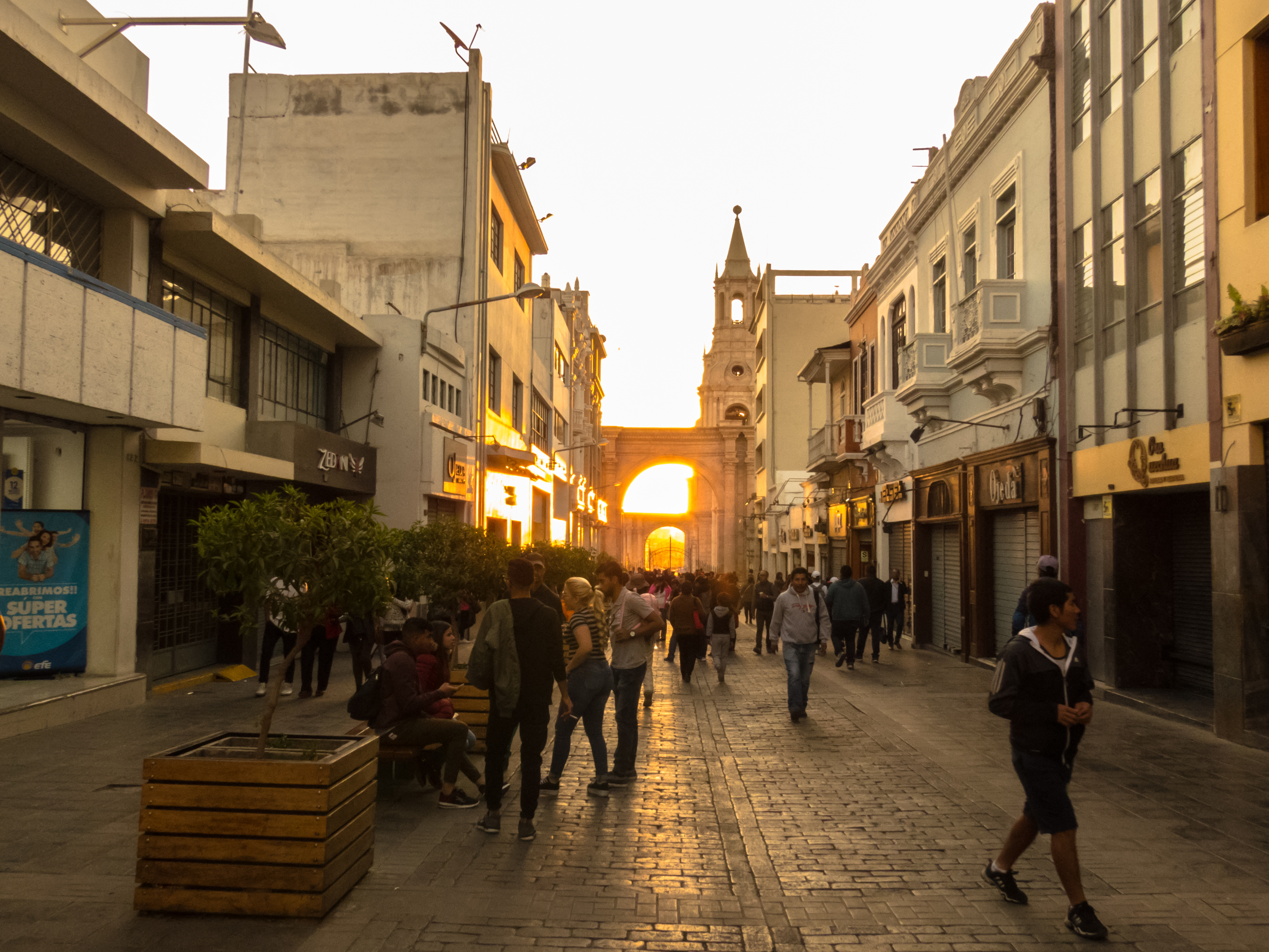 La Mercaderes de la Ciudad de Arequipa es la más concurrida por visitantes y locales en el Centro de Arequipa, con atractivas puestas de sol.